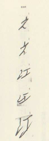 狭山事件の脅迫状における「え」「江」の文字写真。